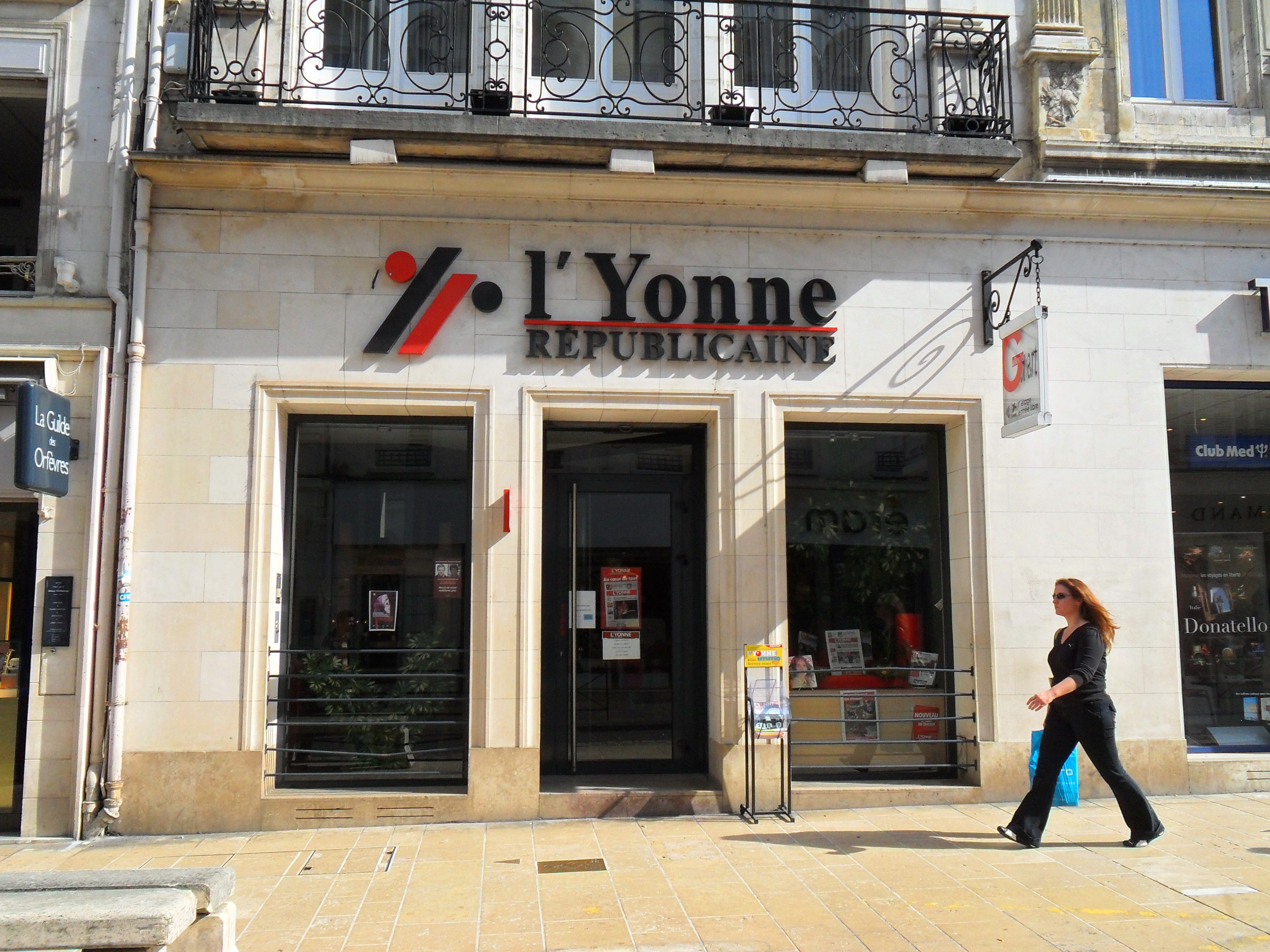 Siège de l'Yonne Républicaine au centre-ville